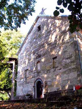 = Лиценца: ==